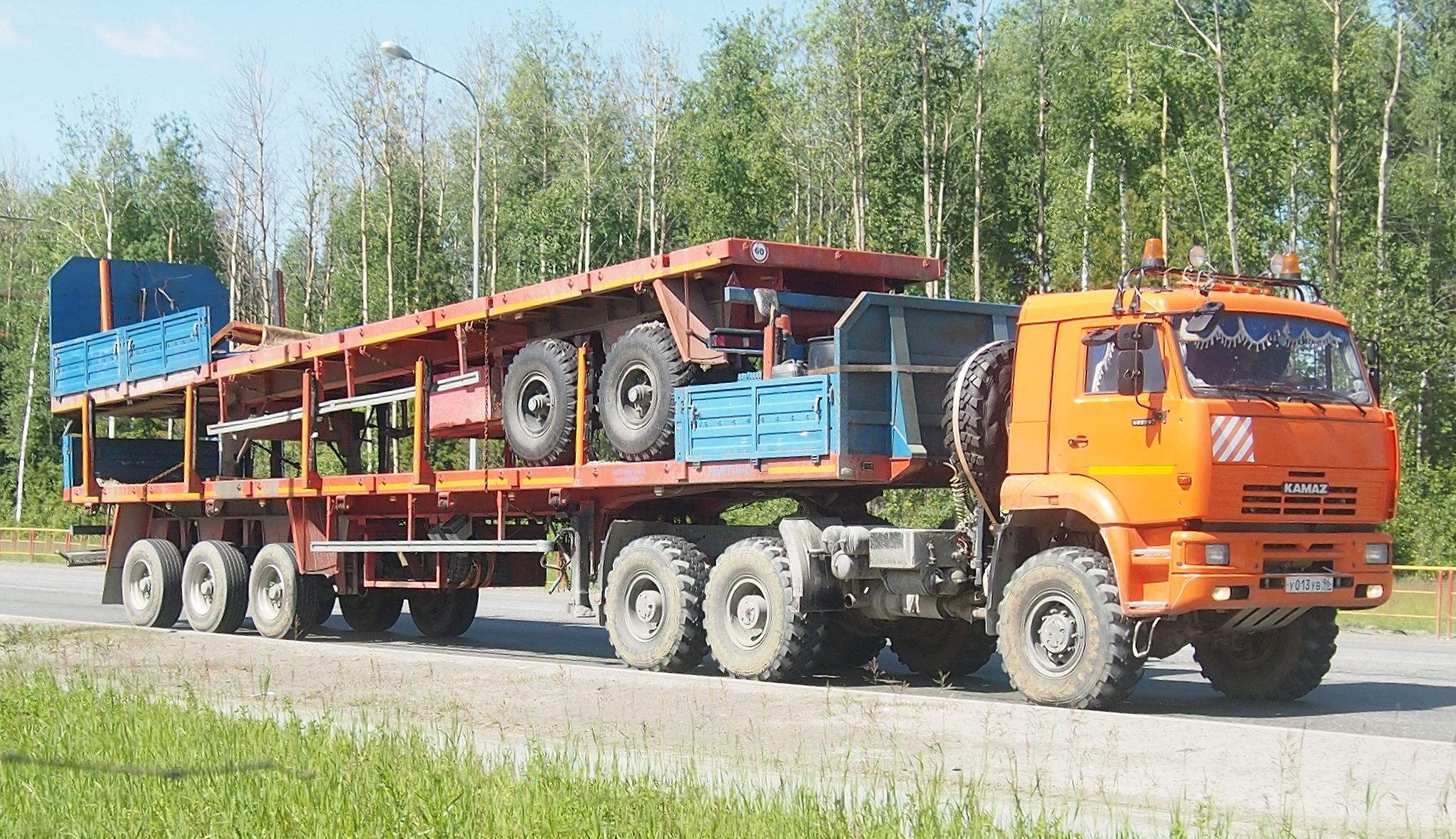 КАМАЗ-65225, Ханты-Мансийск